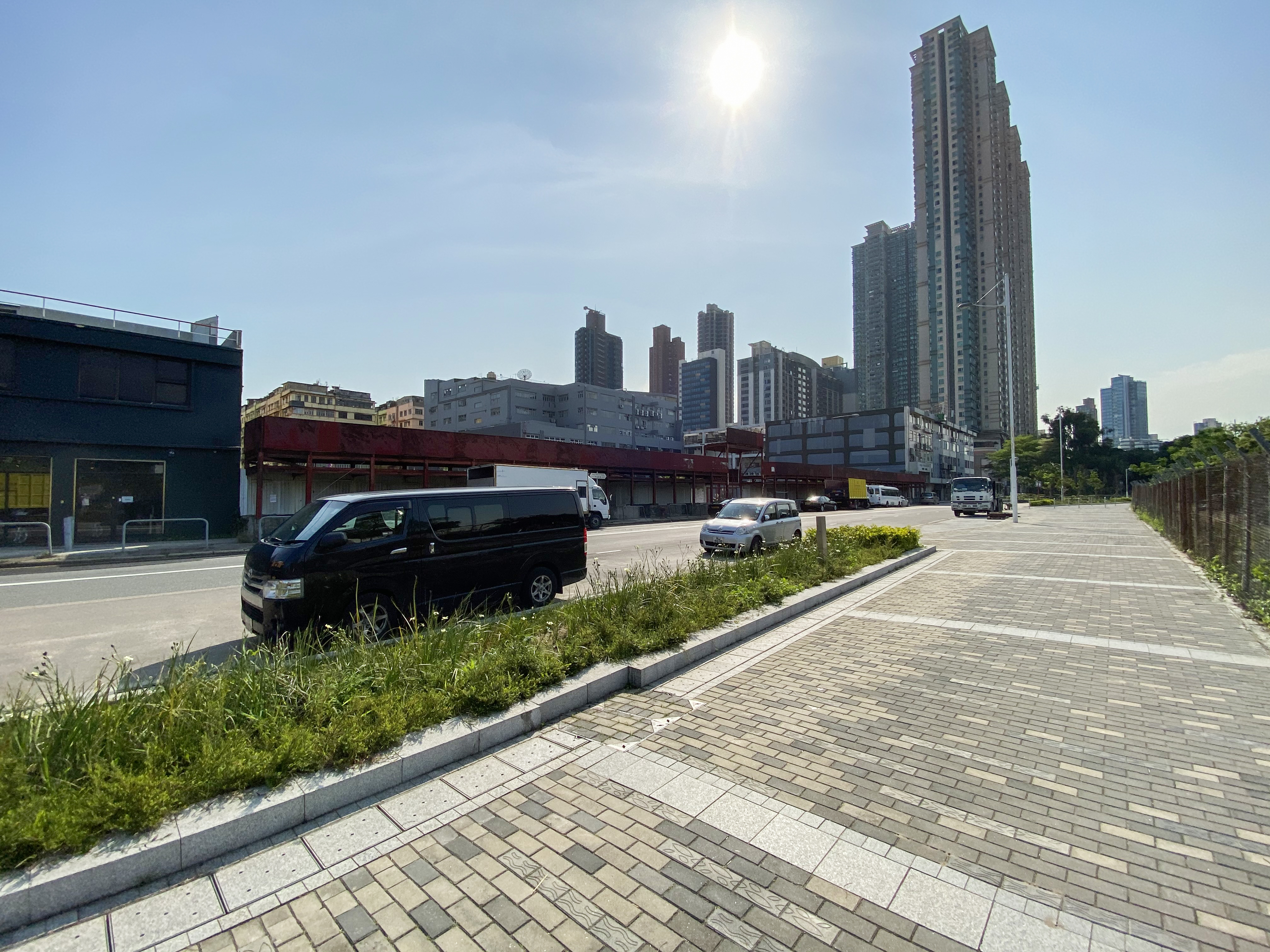 Sung Wong Toi Road